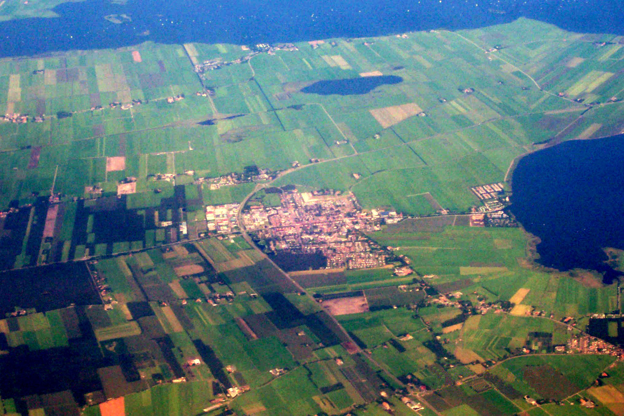 Balk is een dorp in de provincie Friesland (Nederland). Het is de hoofdplaats van de gemeente Gaasterland-Sloten (Gaasterlân-Sleat), Balk